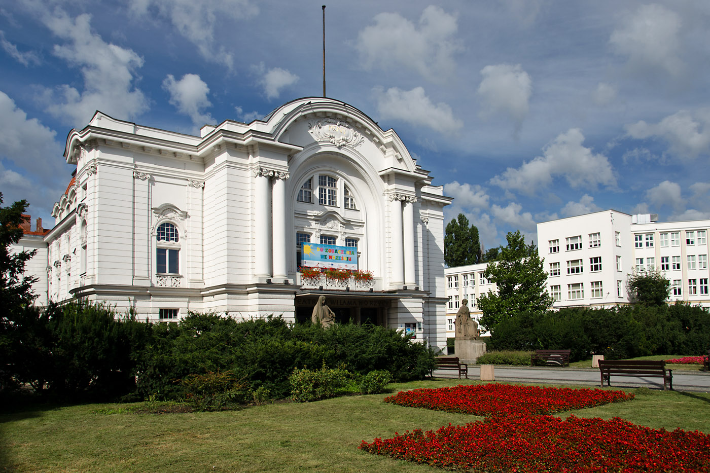 Teatr Miejski, ob. im. Wiliama Horzycy, 1903-1904 Toruń, pl. Teatralny 1, miasto Toruń